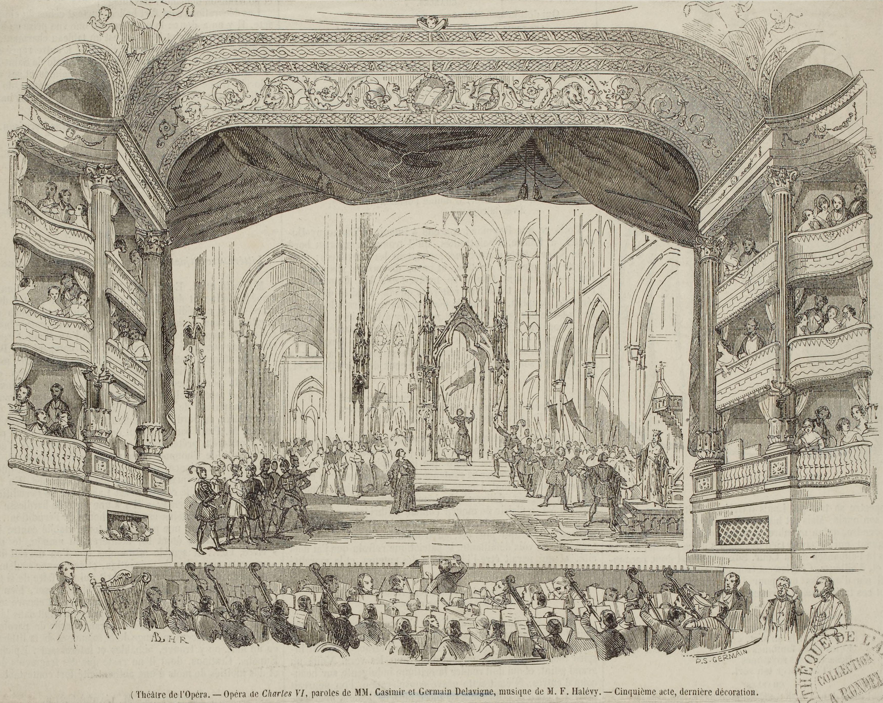 Dernier tableau du dernier acte de Charles VI, opéra de J.F. Halévy, représentant l'intérieur de la basilique de Saint-Denis